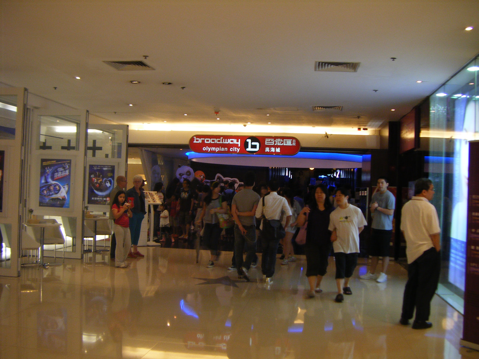 奧海城百老匯